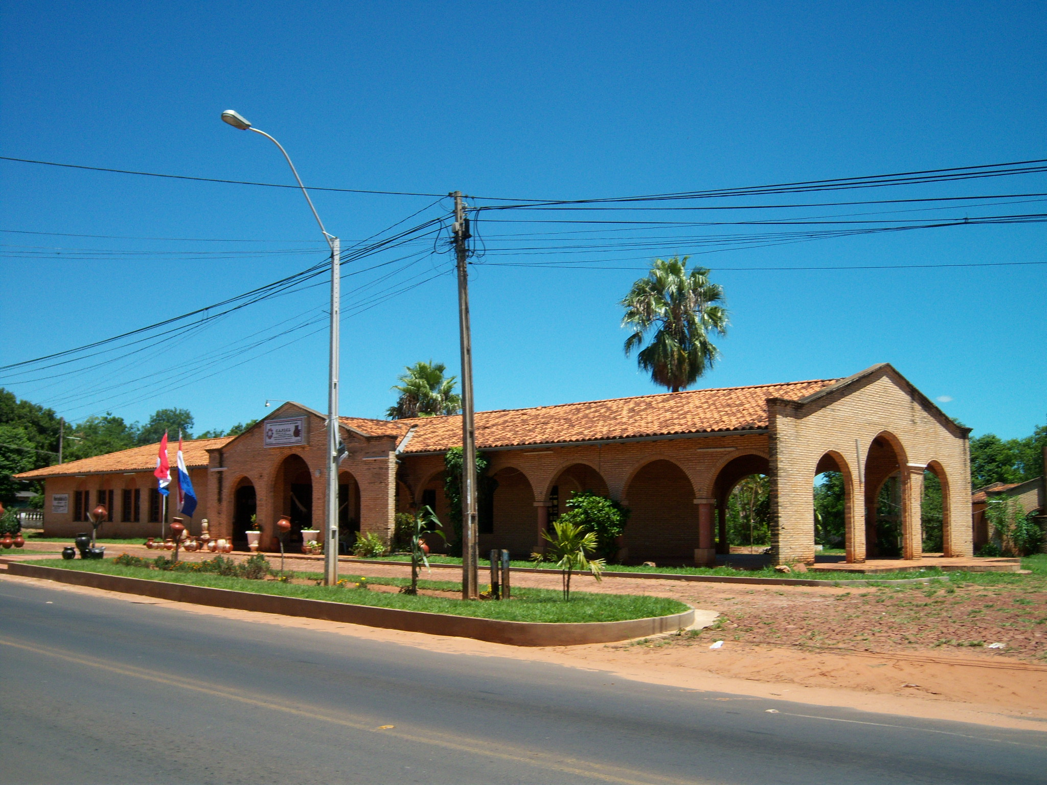 Centro Artesanal en Itá